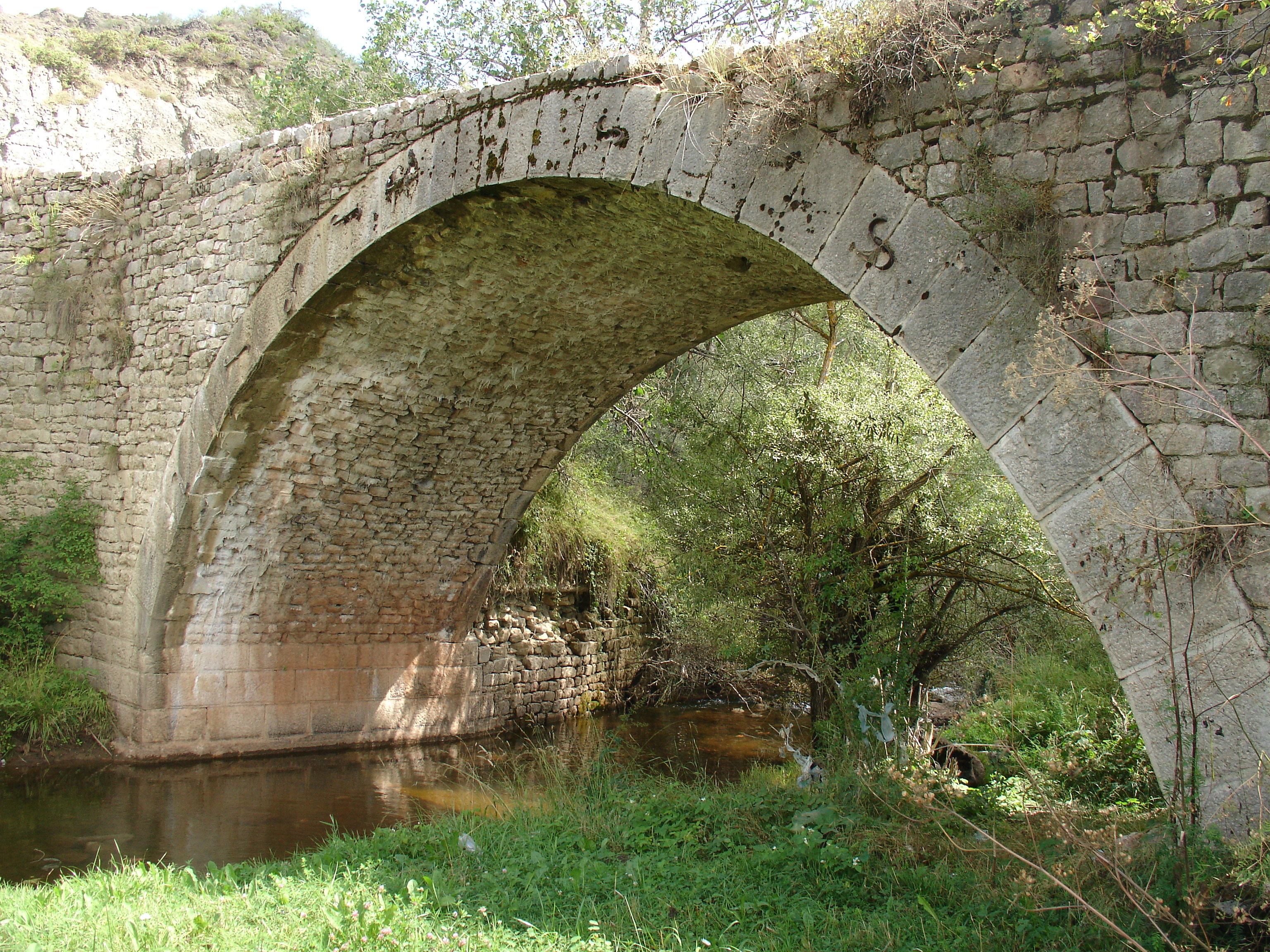 Ura e Voskopojes